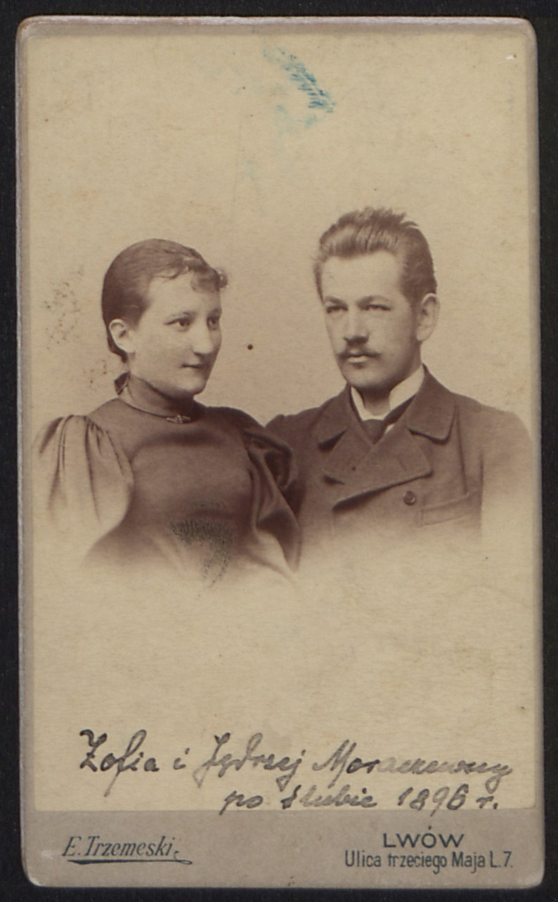 Zofia i Jędrzej Moraczewscy, 1896 r.